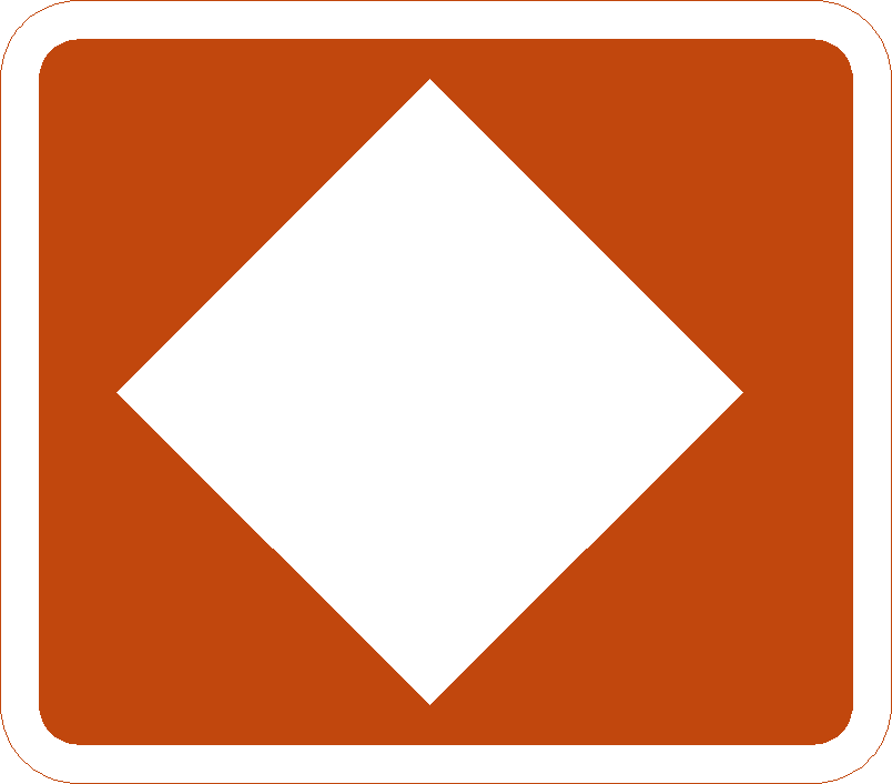 Symbol: Touristischer Hinweis